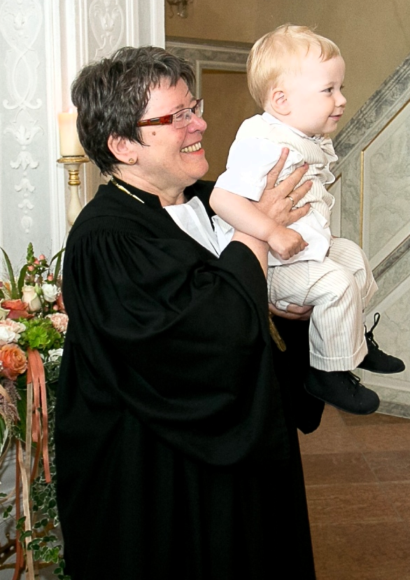 Landesbischöfin Ilse Junkermann während der Taufe eines Kindes